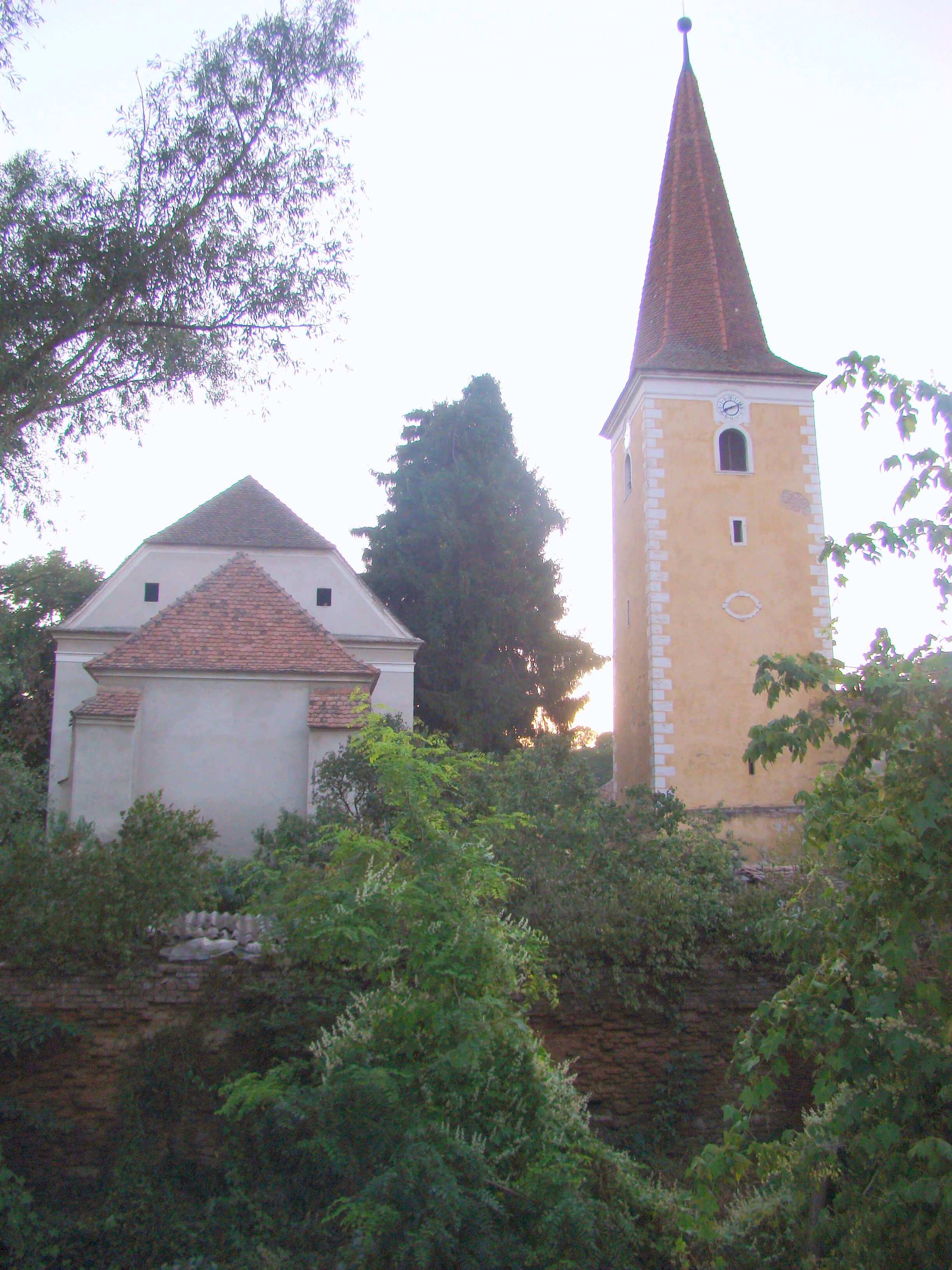 Jidvei, Alba 03